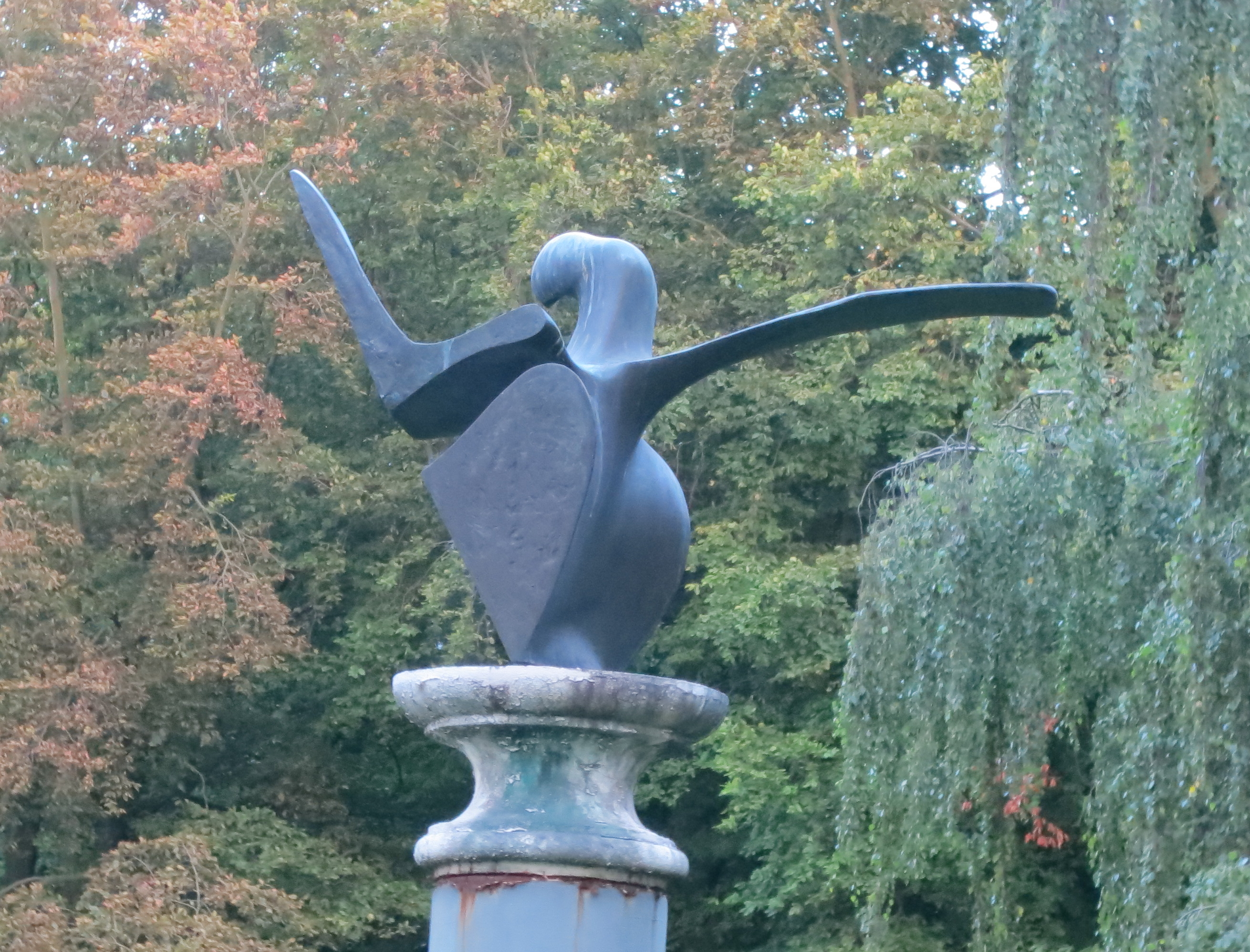 Kota, skulptur i området Kronborg i Malmö